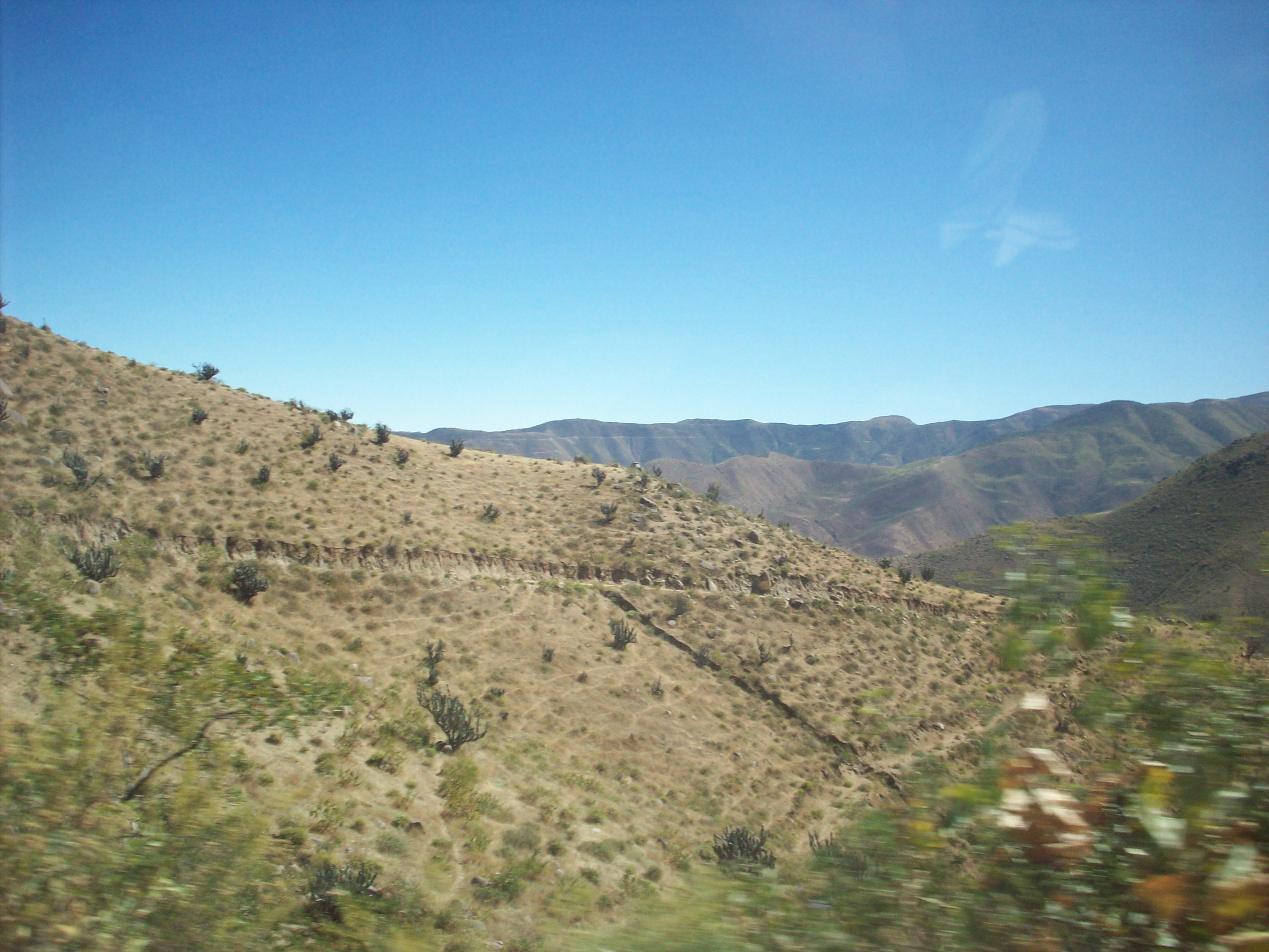 Clima de Ocaña Peru